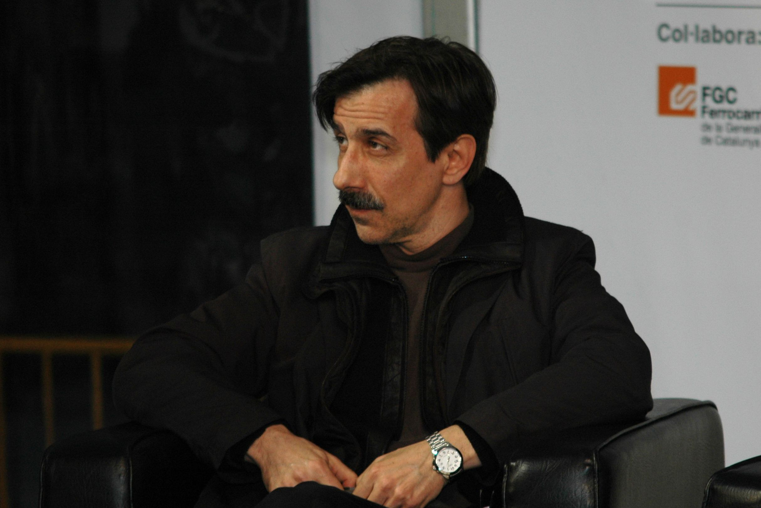 Jordi Boixaderas i Trullàs